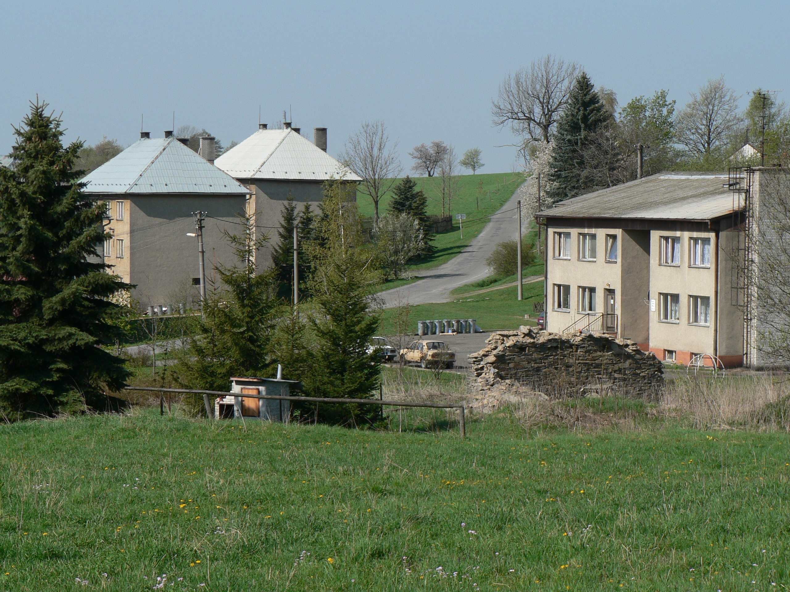 Nová zástavba v Jiříkově.